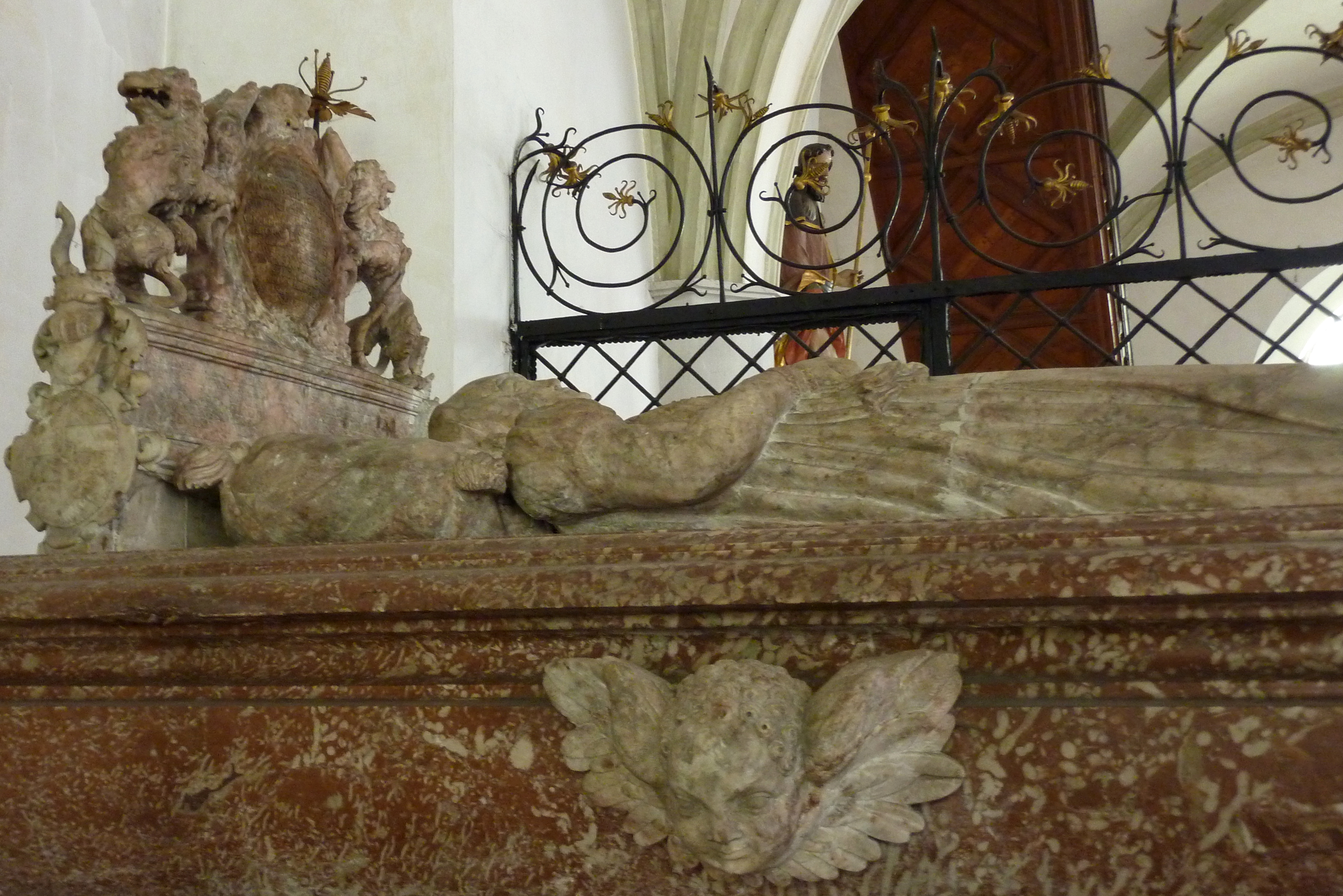 Kenotaph der Pfalzgräfin Elisabeth von Pfalz-Neuburg in der Stadtpfarrkirche St. Martin in Lauingen im Landkreis Dillingen an der Donau (Bayern)